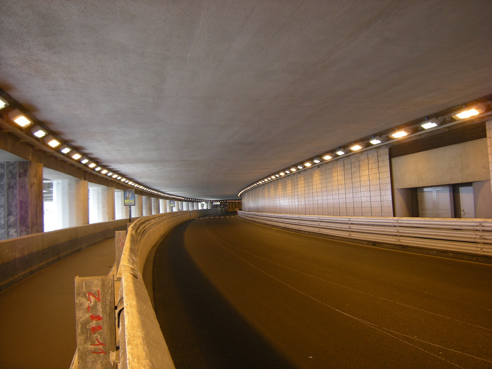 Monte Carlo